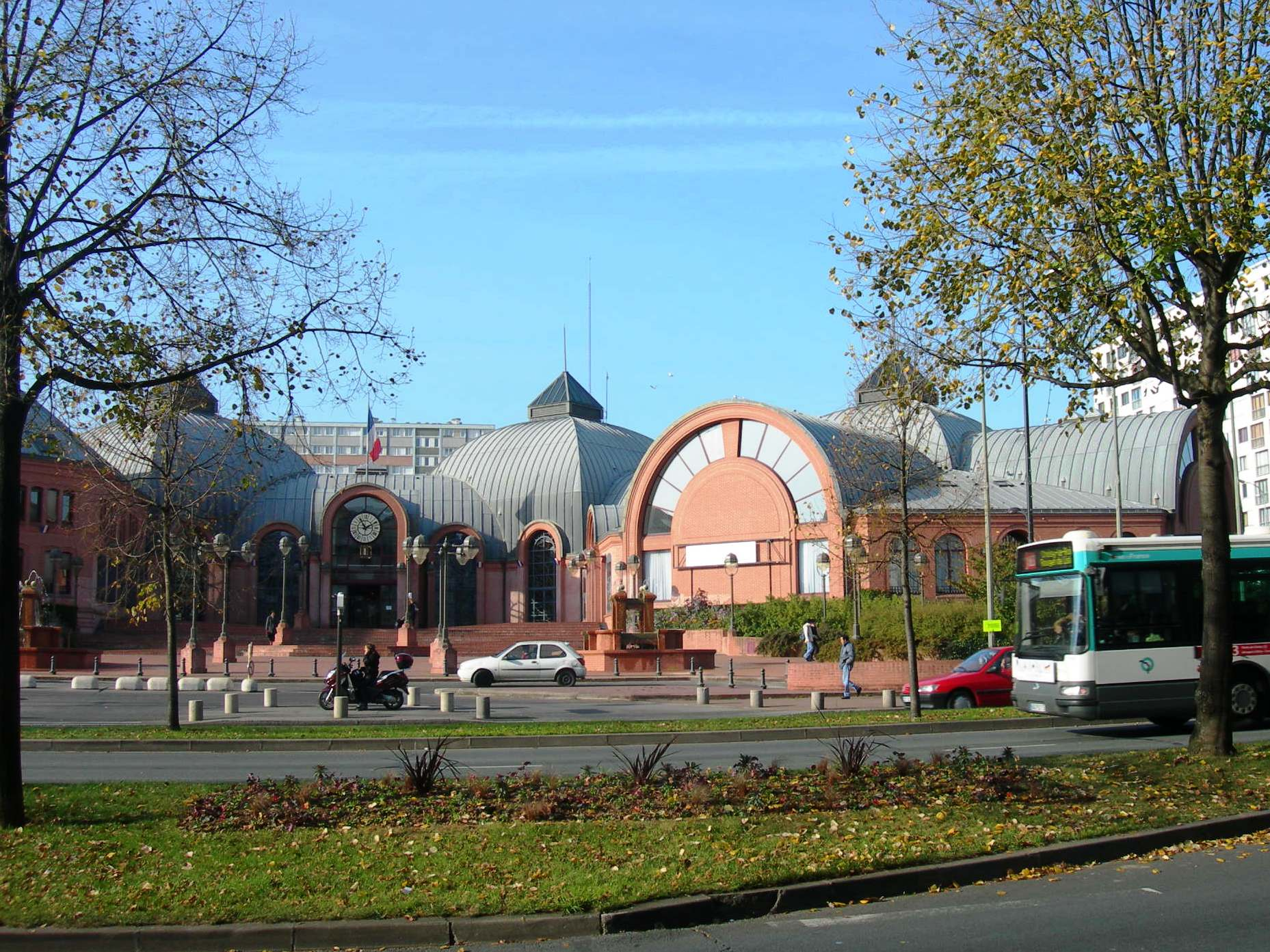 Vitry-sur-Seine (Val-de-Marne, France) : L'hôtel-de-Ville (construit en 1986).